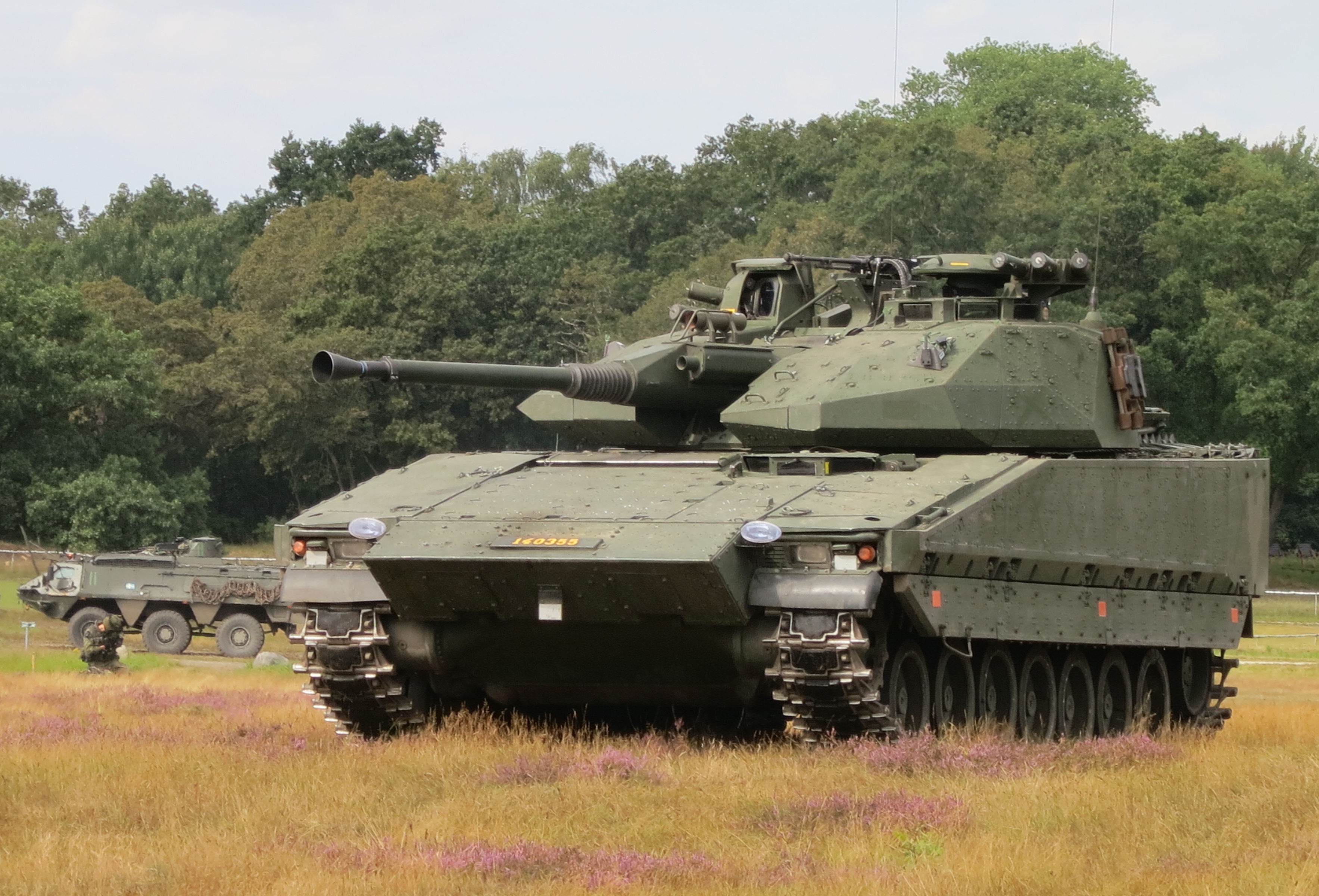 Stridsfordon 90 vid P 7 Regementets dag 2012